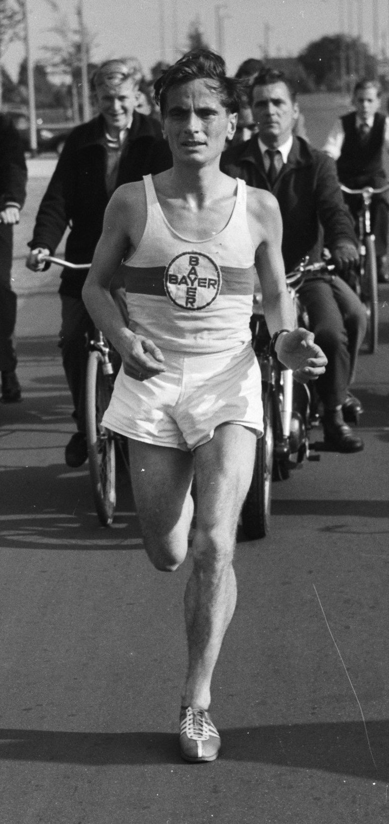 Collectie / Archief : Fotocollectie Anefo Reportage / Serie : [ onbekend ] Beschrijving : Kampioenschap Marathonloop. Engelhard (Duitsland) eerste buitenlander Datum : 7 juli 1956 Trefwoorden : KAMPIOENSCHAPPEN, marathonloop Fotograaf : Behrens, Herbert / Anefo Auteursrechthebbende : Nationaal Archief Materiaalsoort : Negatief (zwart/wit) Nummer archiefinventaris : bekijk toegang 2.24.01.04 Bestanddeelnummer : 907-8772